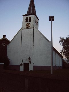 Foto genomen door A.R. de Wilde van de kerk in Est op 16-1-2007